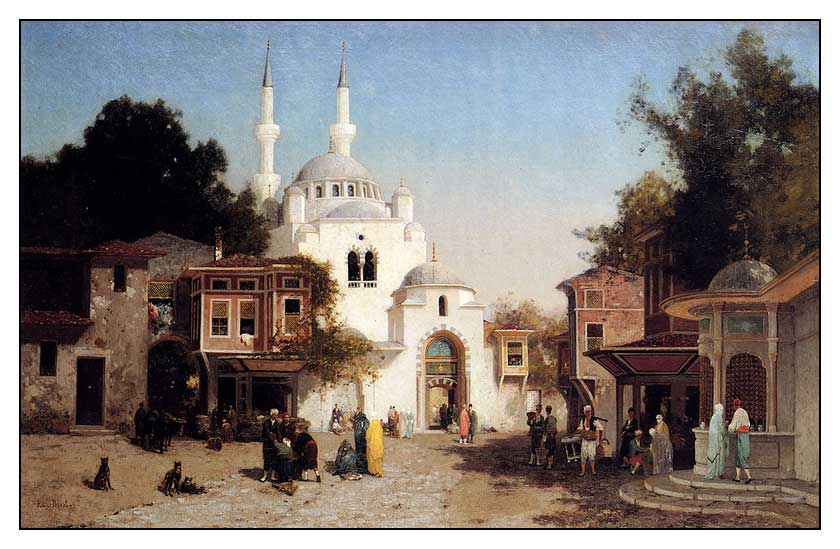 Une mosquée de Constantinople.